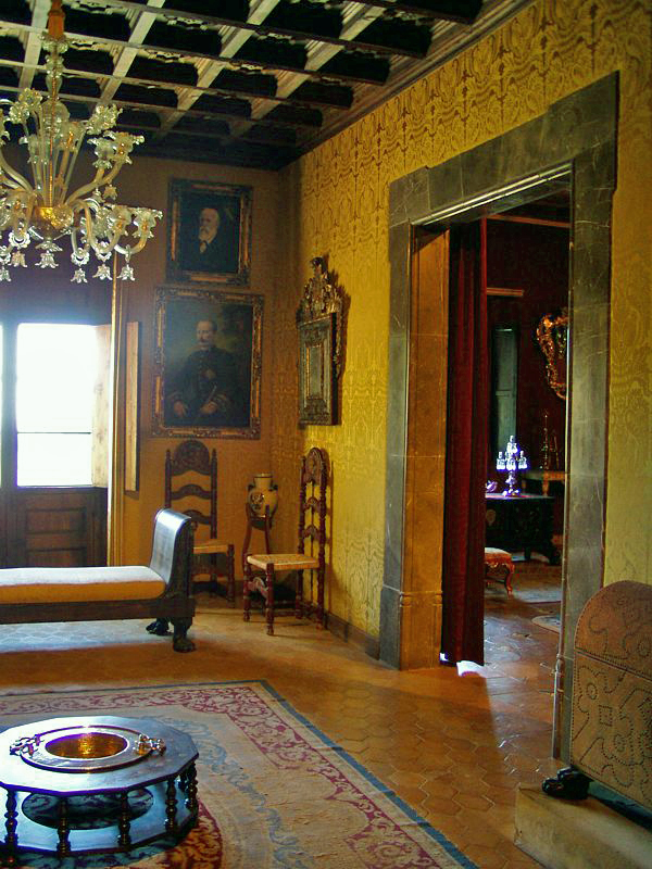 Pałac króla Sancha I w Valldemossa